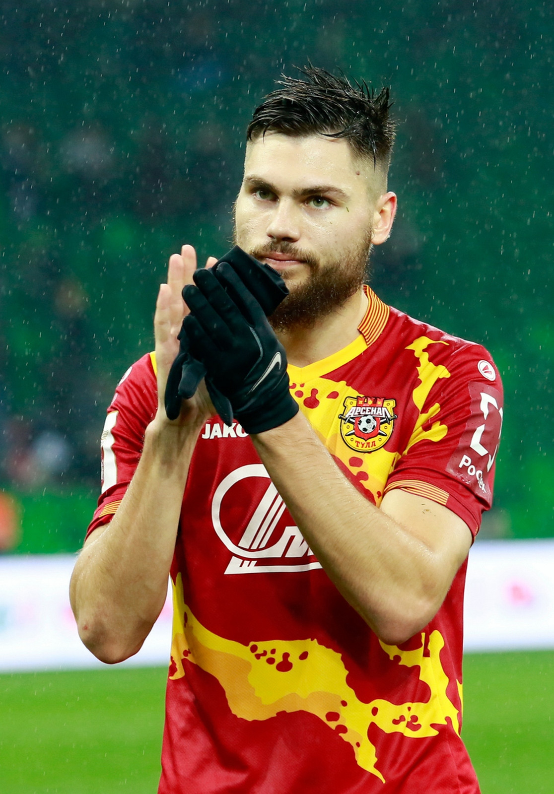 «Краснодар» - «Арсенал»